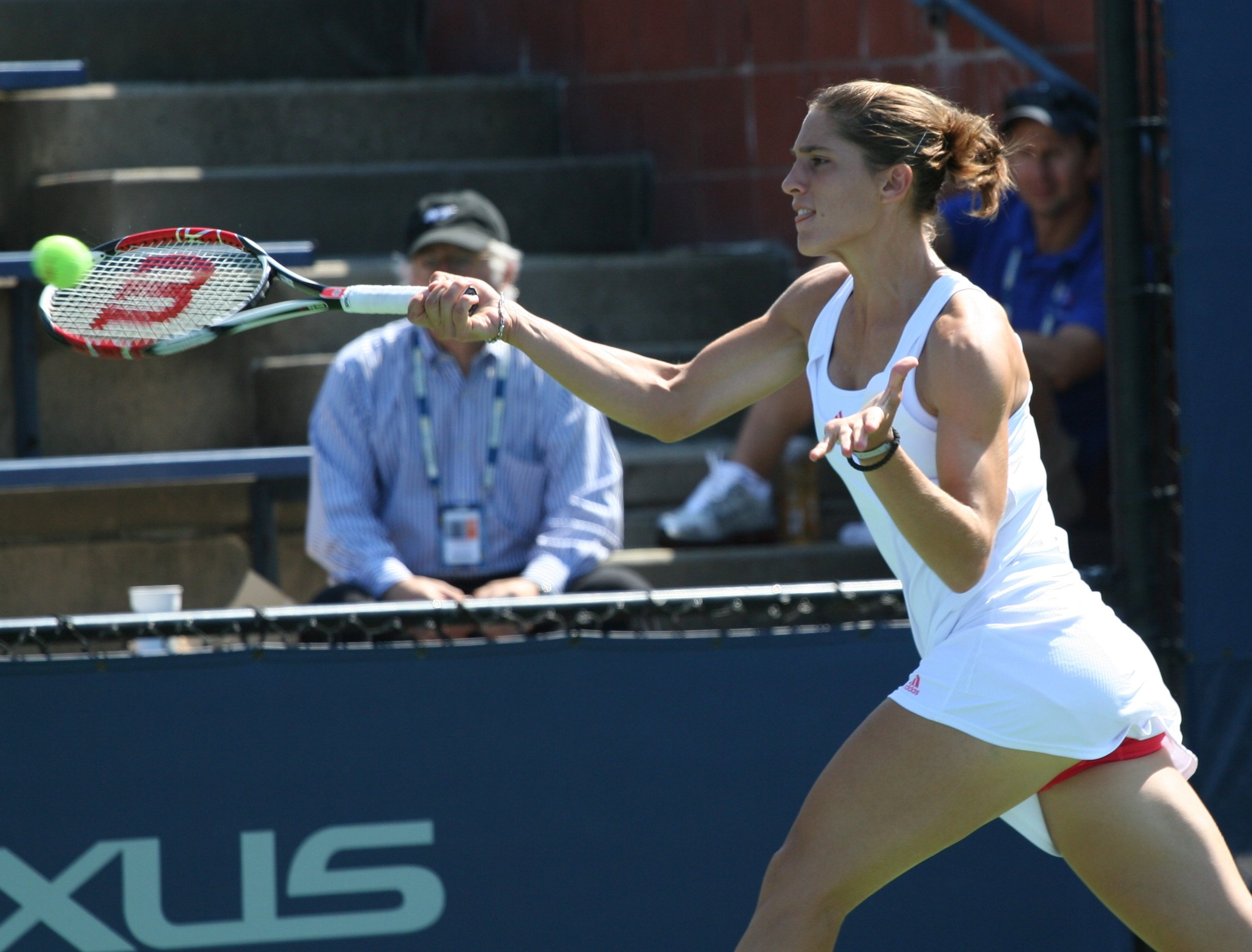 U.S. Open Saturday, Sept. 5, 2009